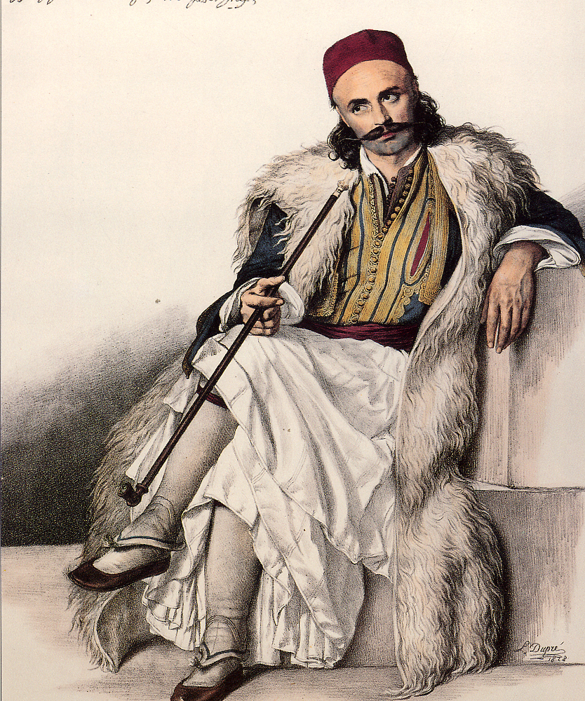 Vasilis Goudas, adjutant of Markos Botsaris